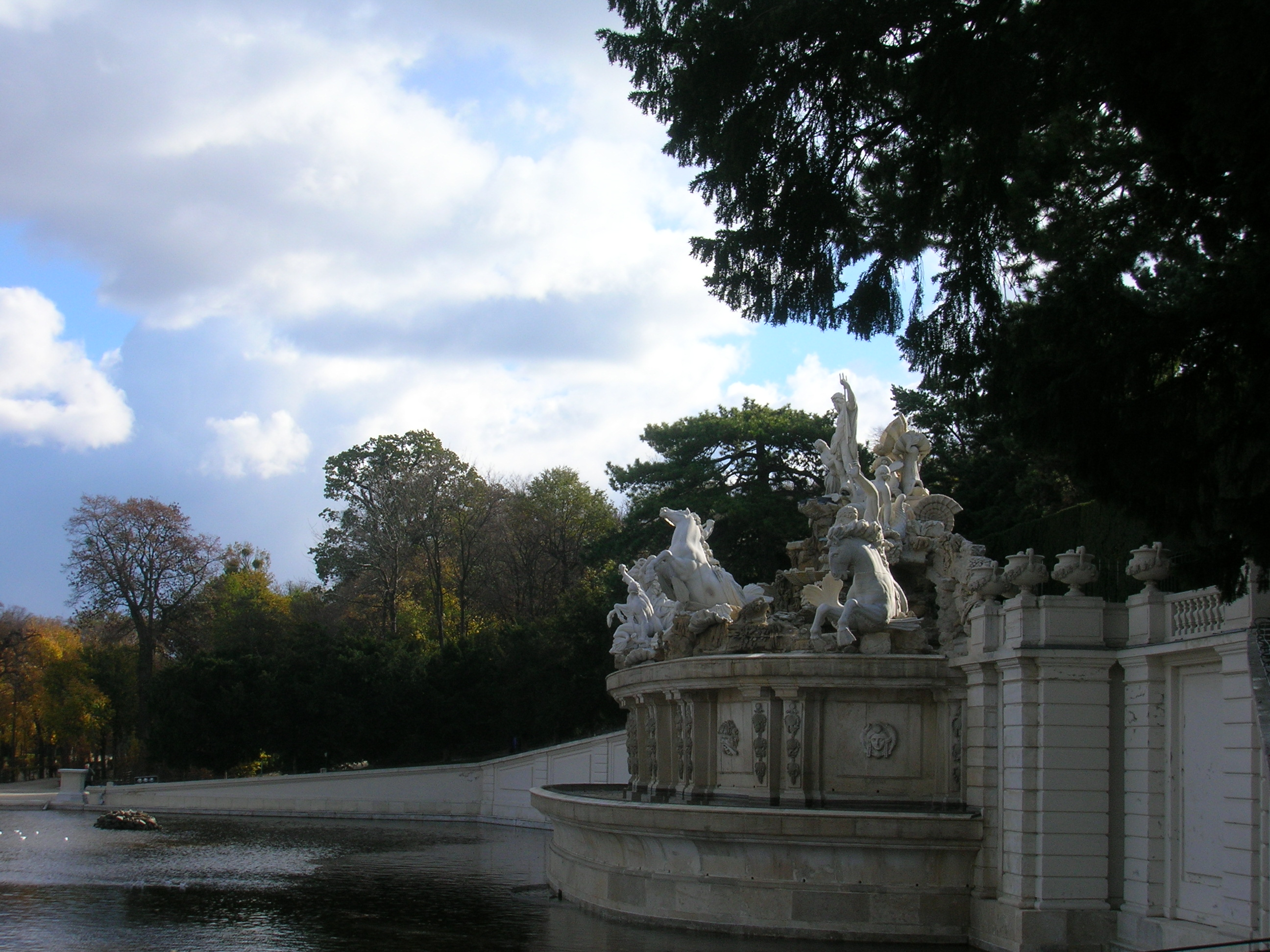 der Neptunbrunnen im Park Schönbrunn in Wien